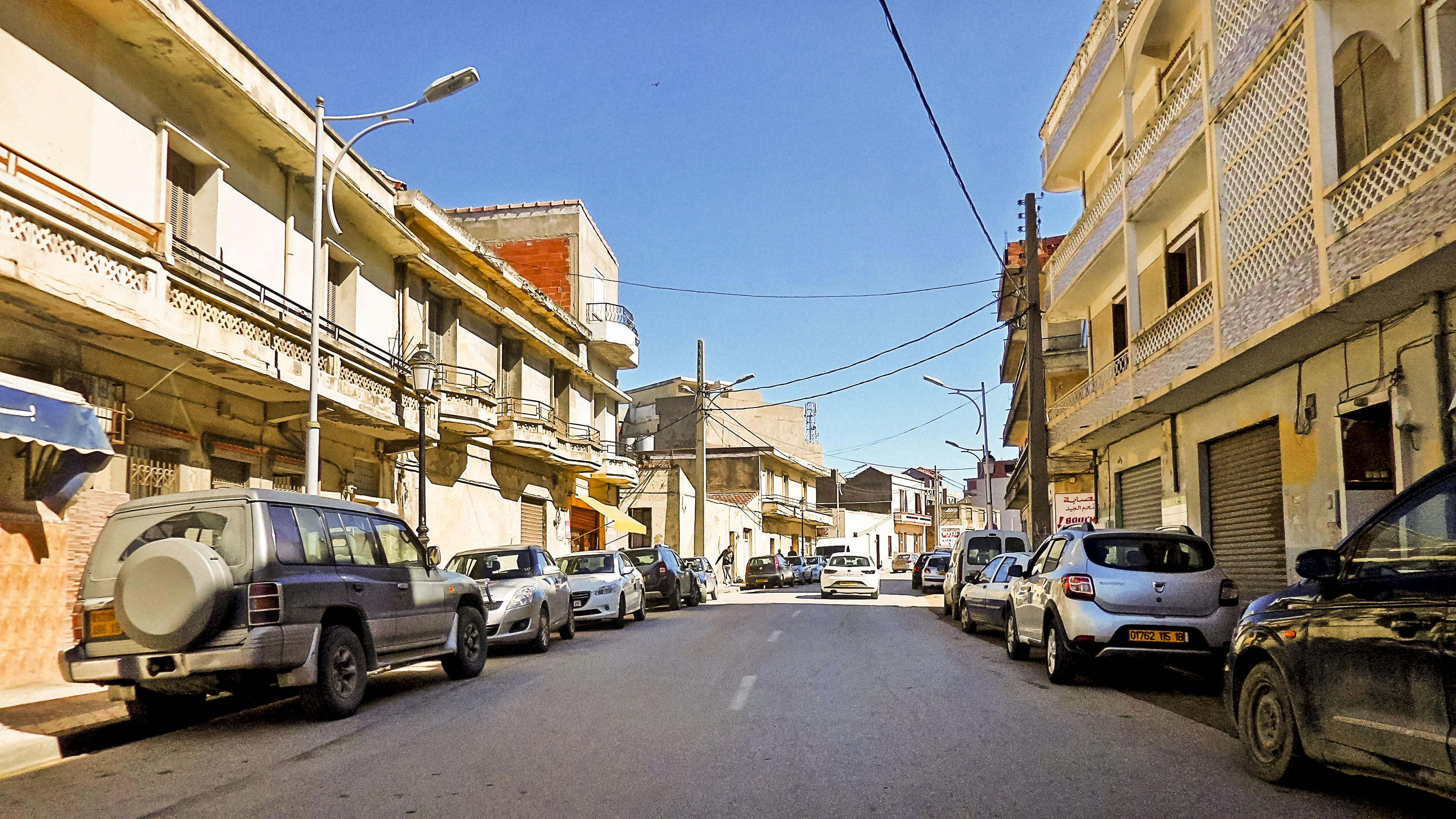 Ville de Jijel مدينة جيجل Ville de Jijel مدينة جيجل